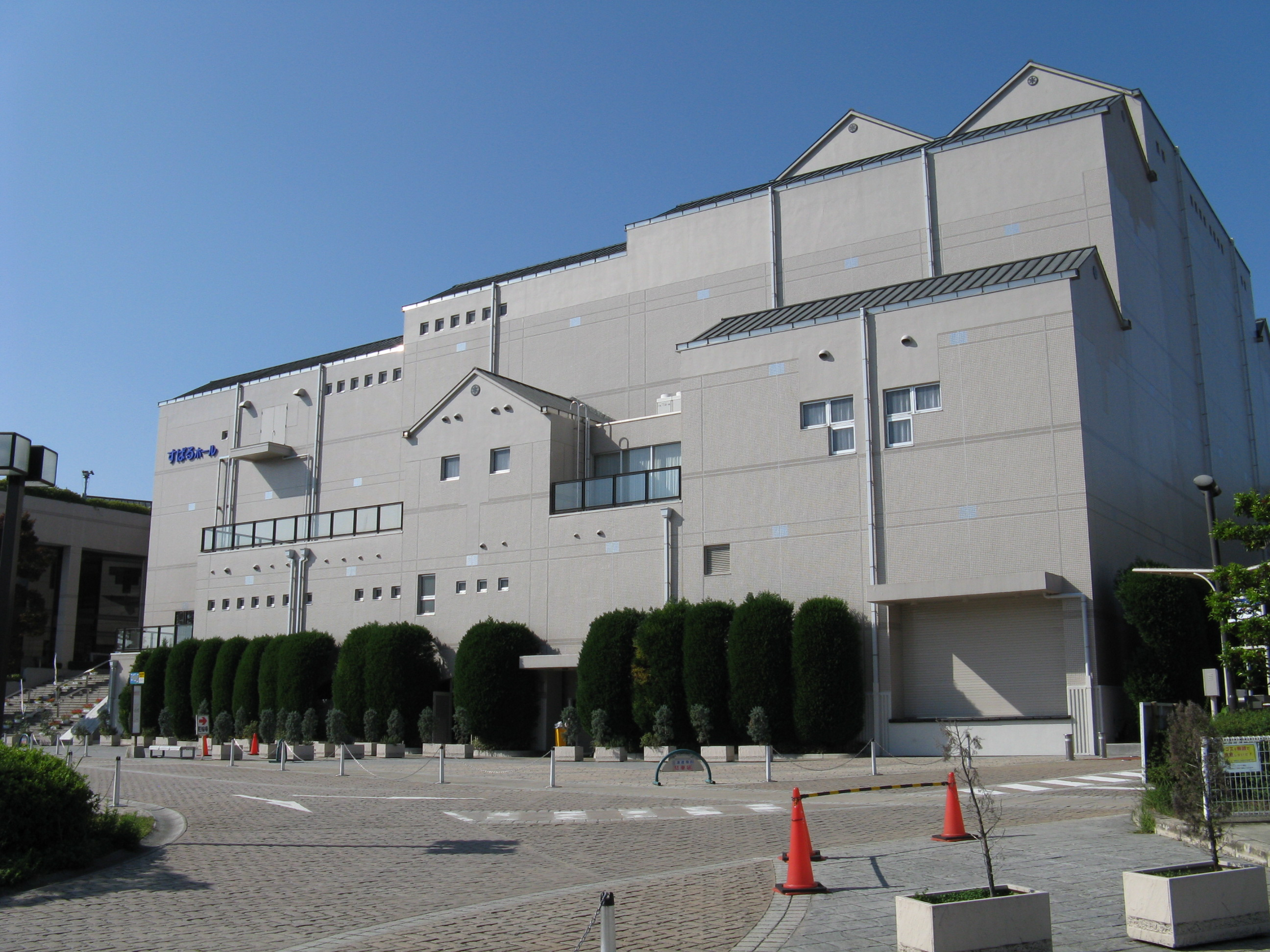 すばるホール